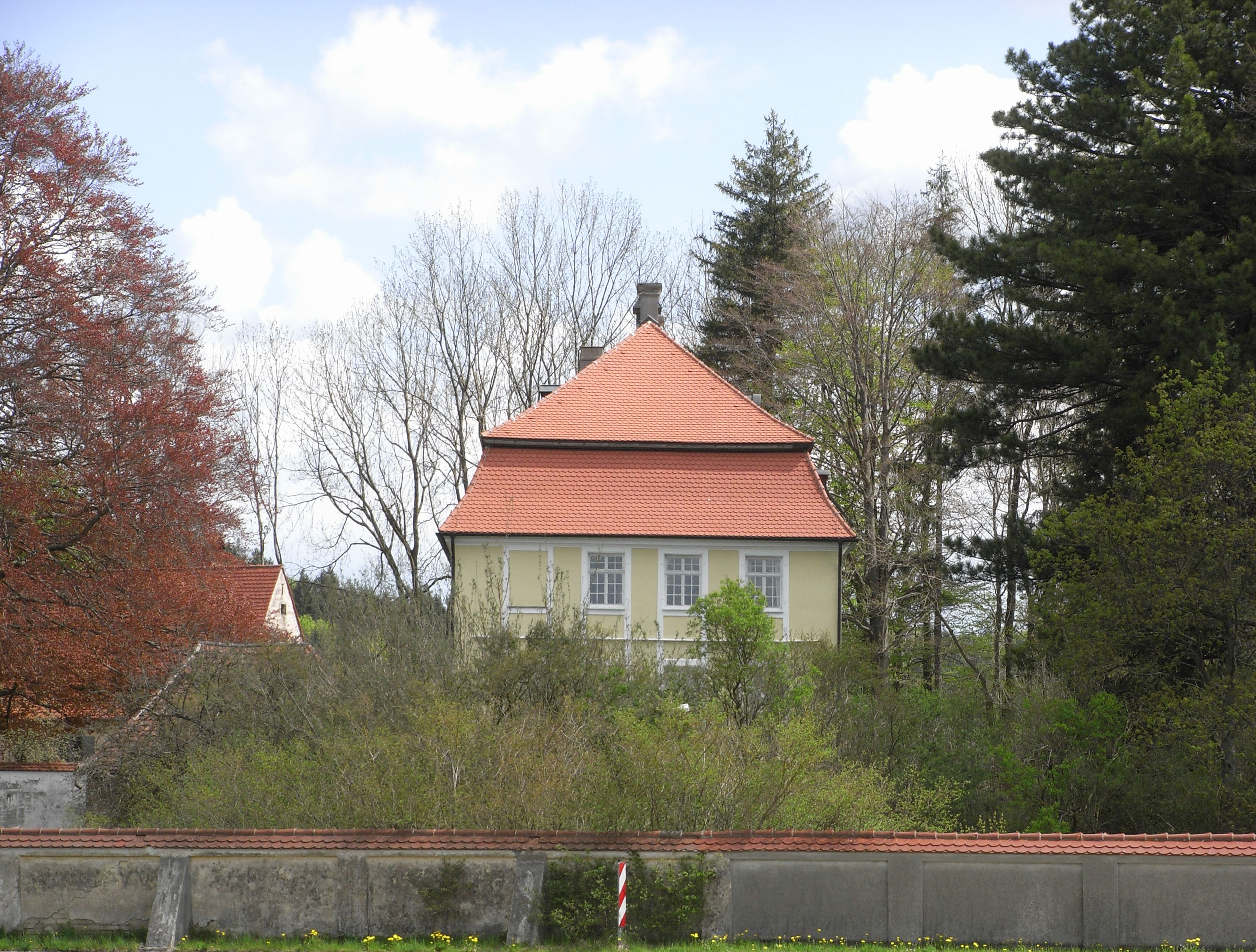 Das Grünenfurter Schloß von der Seite Richtung Amendingen aus gesehen.